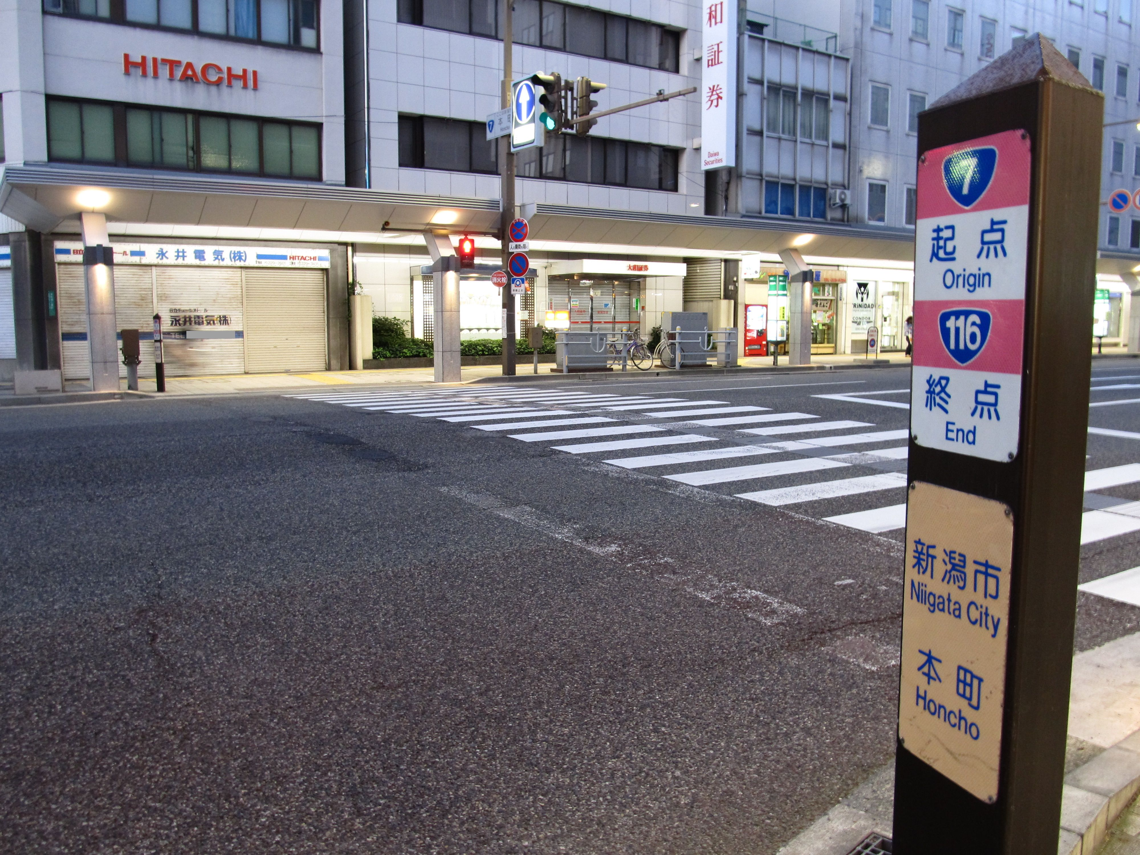 新潟市中央区にある本町交差点。国道7号の起点および国道116号の終点である。